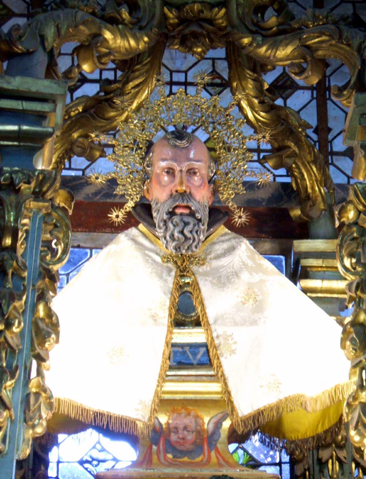 Hermitage of San Saturio, Soria. Bust of the saint